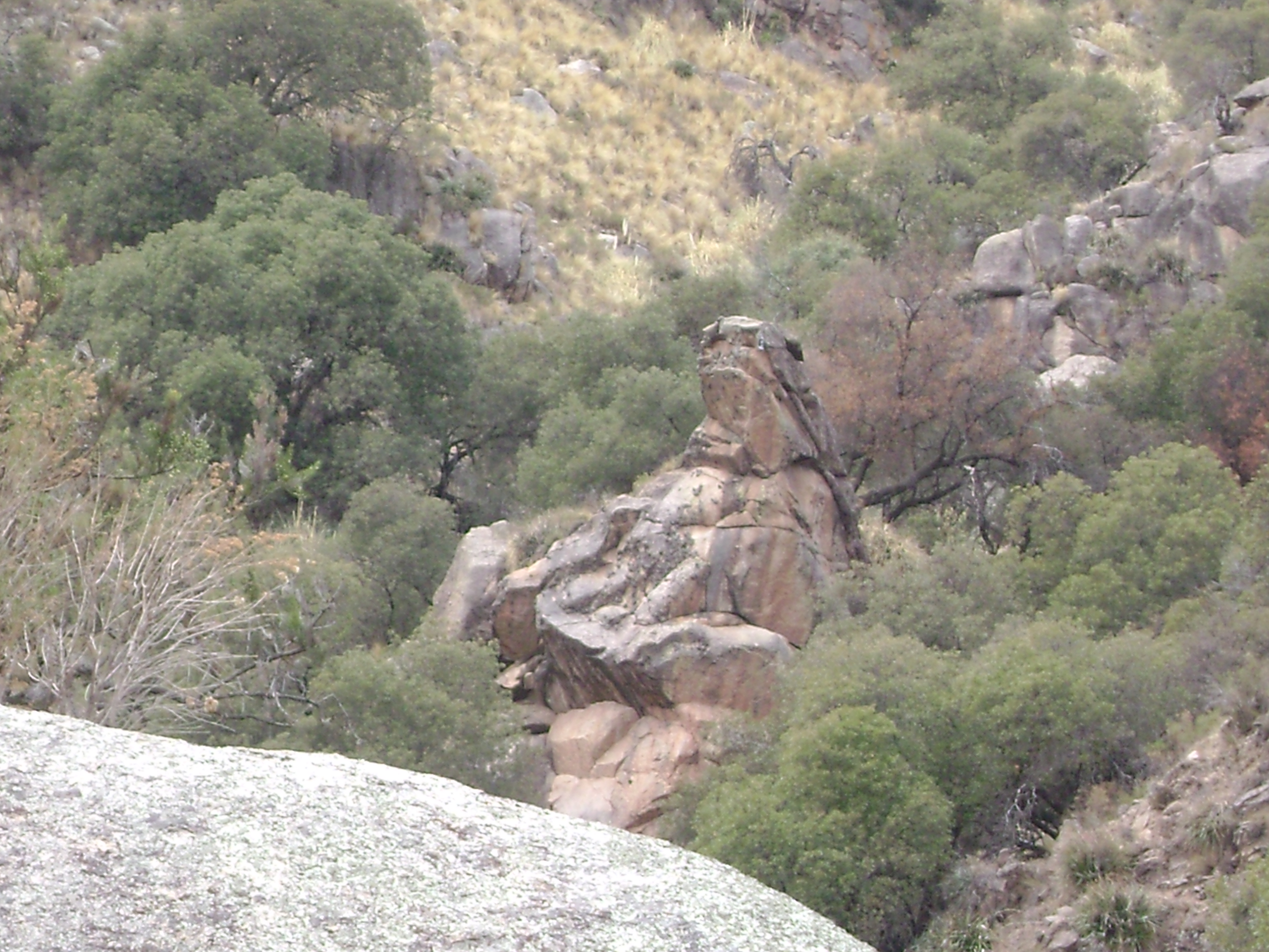 Vegetación baja y espinosa